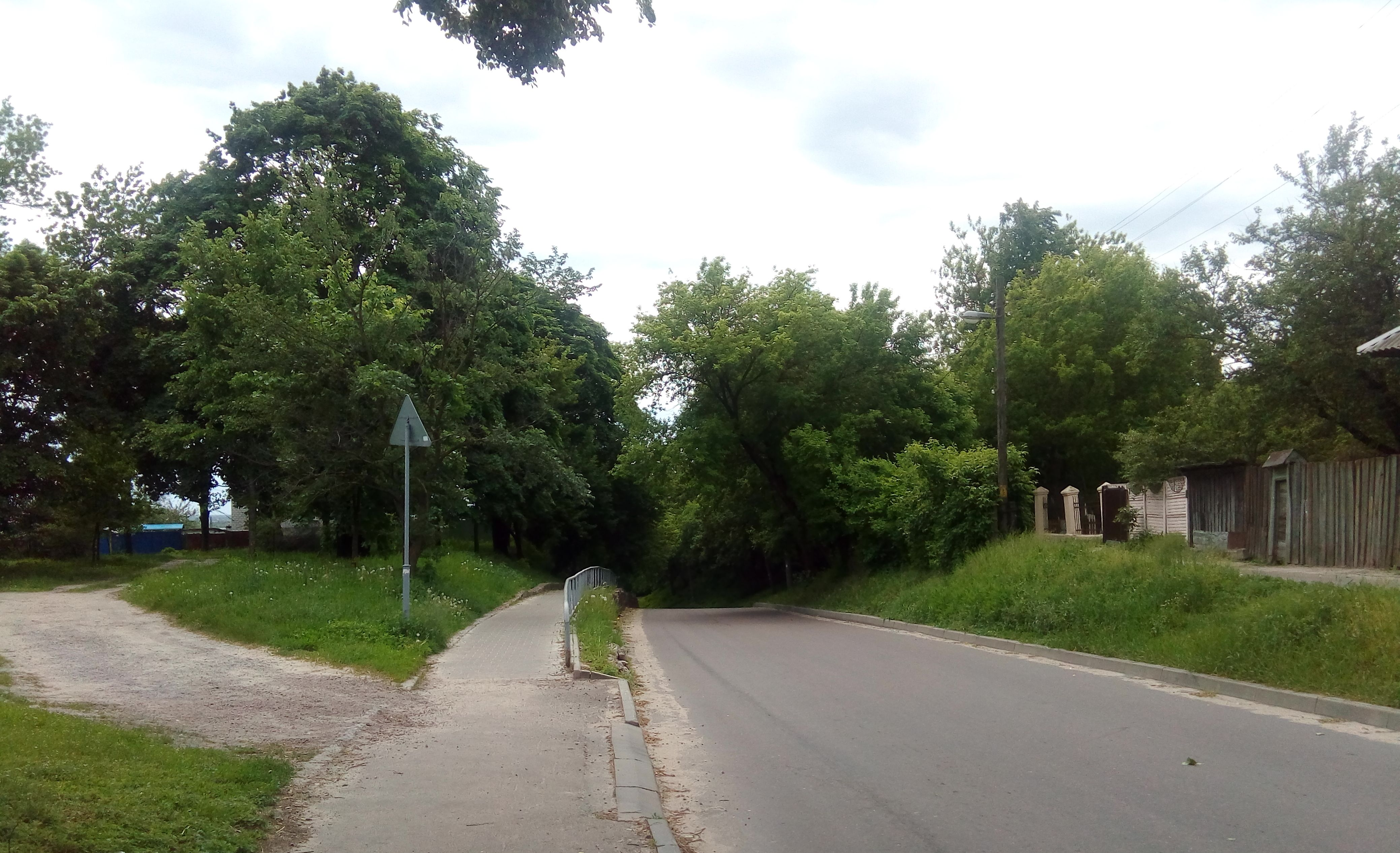 Улица в Монастырьке, историческом районе Гомеля